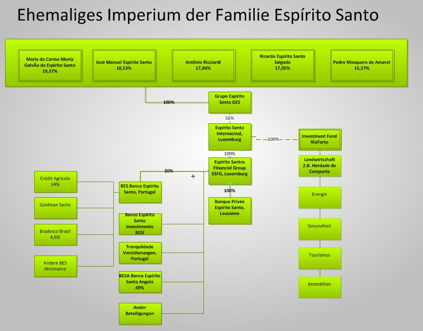 Ehemaliges Konzernimperium der Familie Espírito Santo